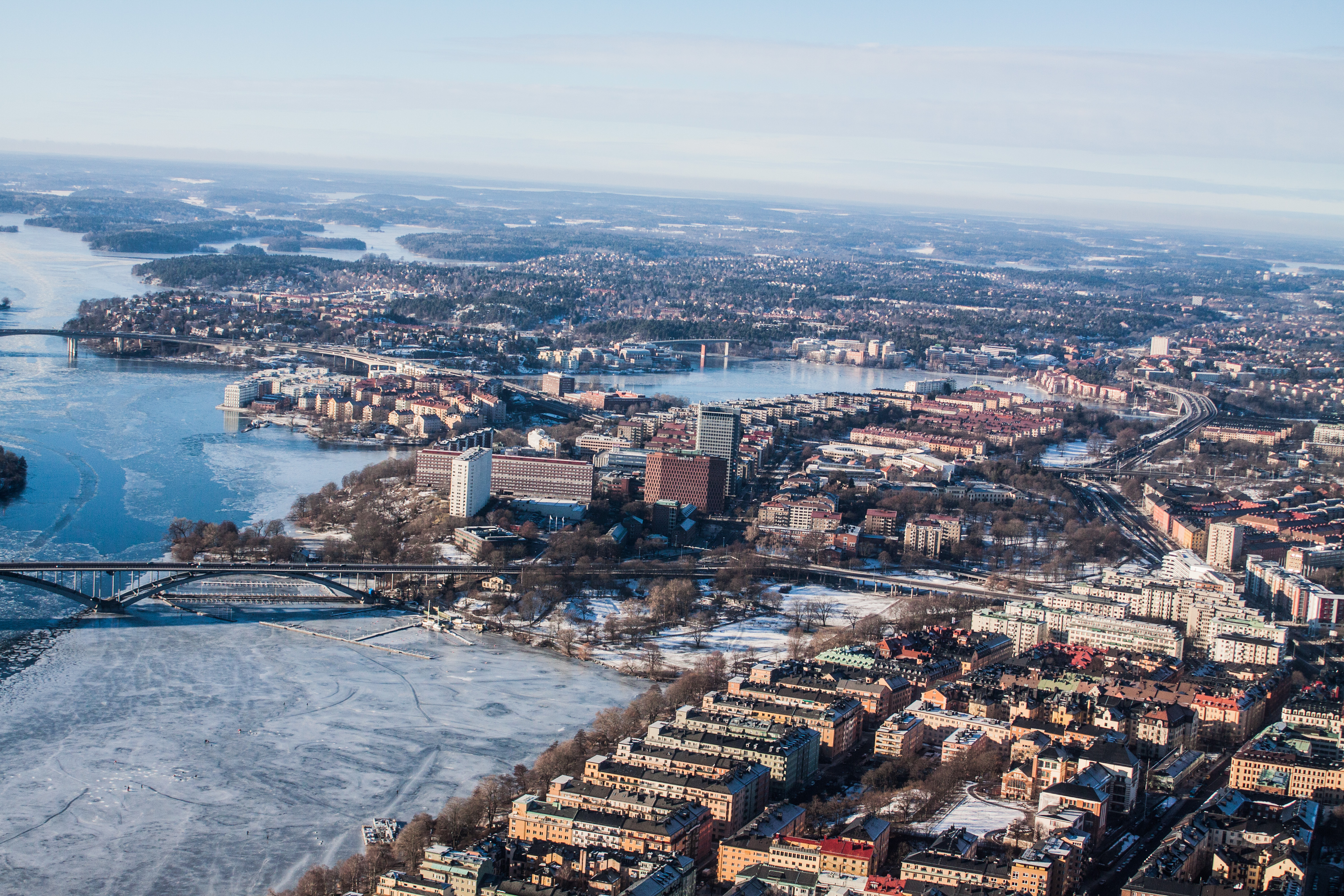 Flygbilder över Stockholms Skärgård arrangerad av Wikimedia